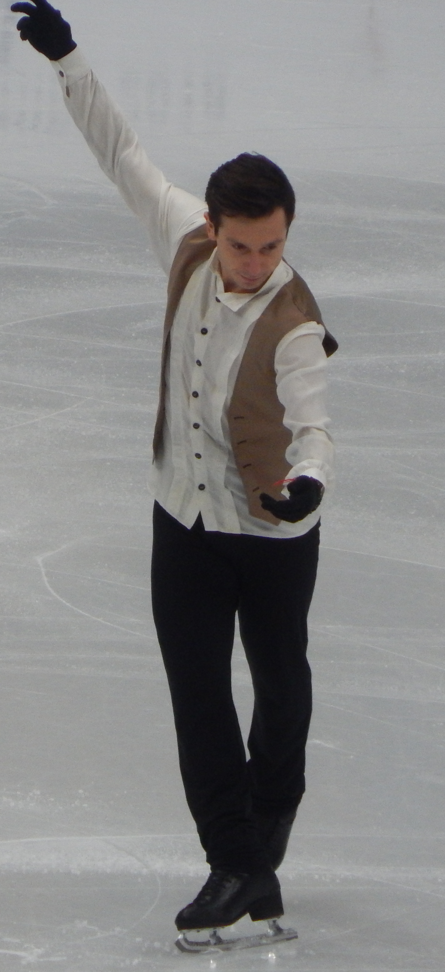 Чемпионат Европы по фигурному катанию 2018 в Москве. Первый день соревнований (17 января). Фигурист из Израиля Алексей Быченко